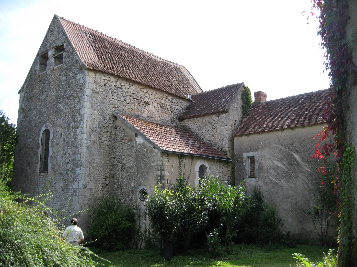 Chapelle de Saint-Marin - Saint-Marcel (Indre)